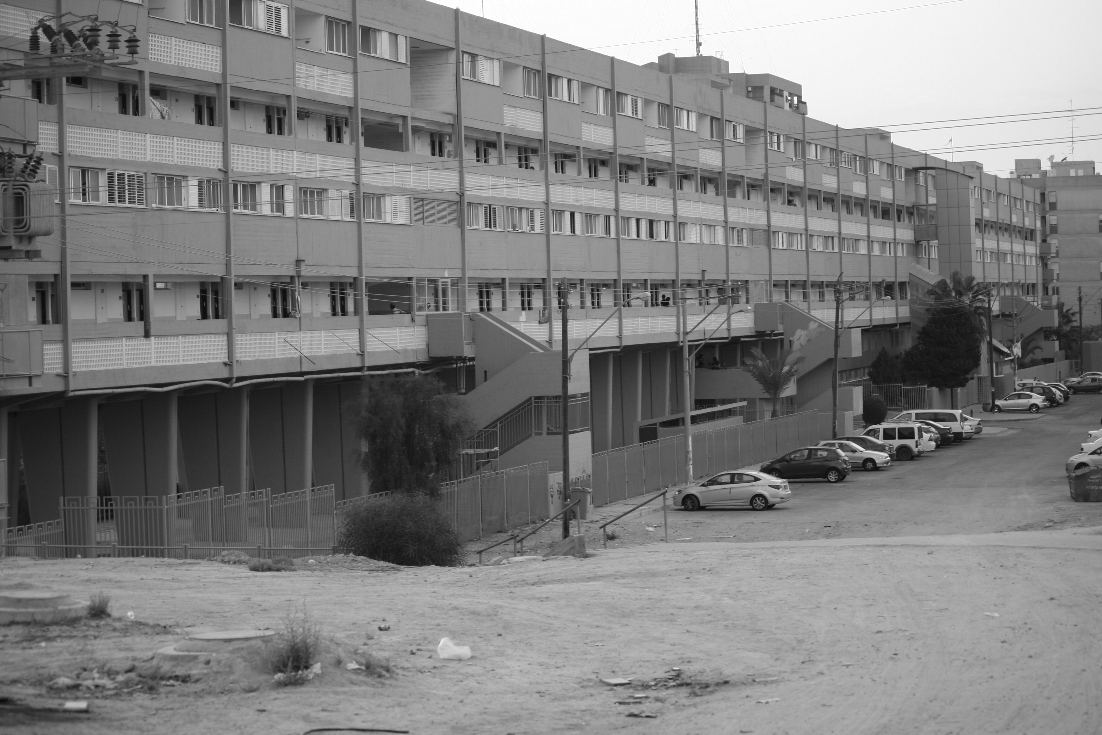 בניין מגורים בתכנון האדריכלים אברהם יסקי ואמנון אלכסנדרוני, בשכונה ה' בבאר שבע. הבניין מכונה "שיכון רבע קילומטר" בשל אורכו הרב, ההופך אותו למבנה הארוך ביותר בישראל. This is a photo of a heritage building in Israel. Its ID is 8-9000-004